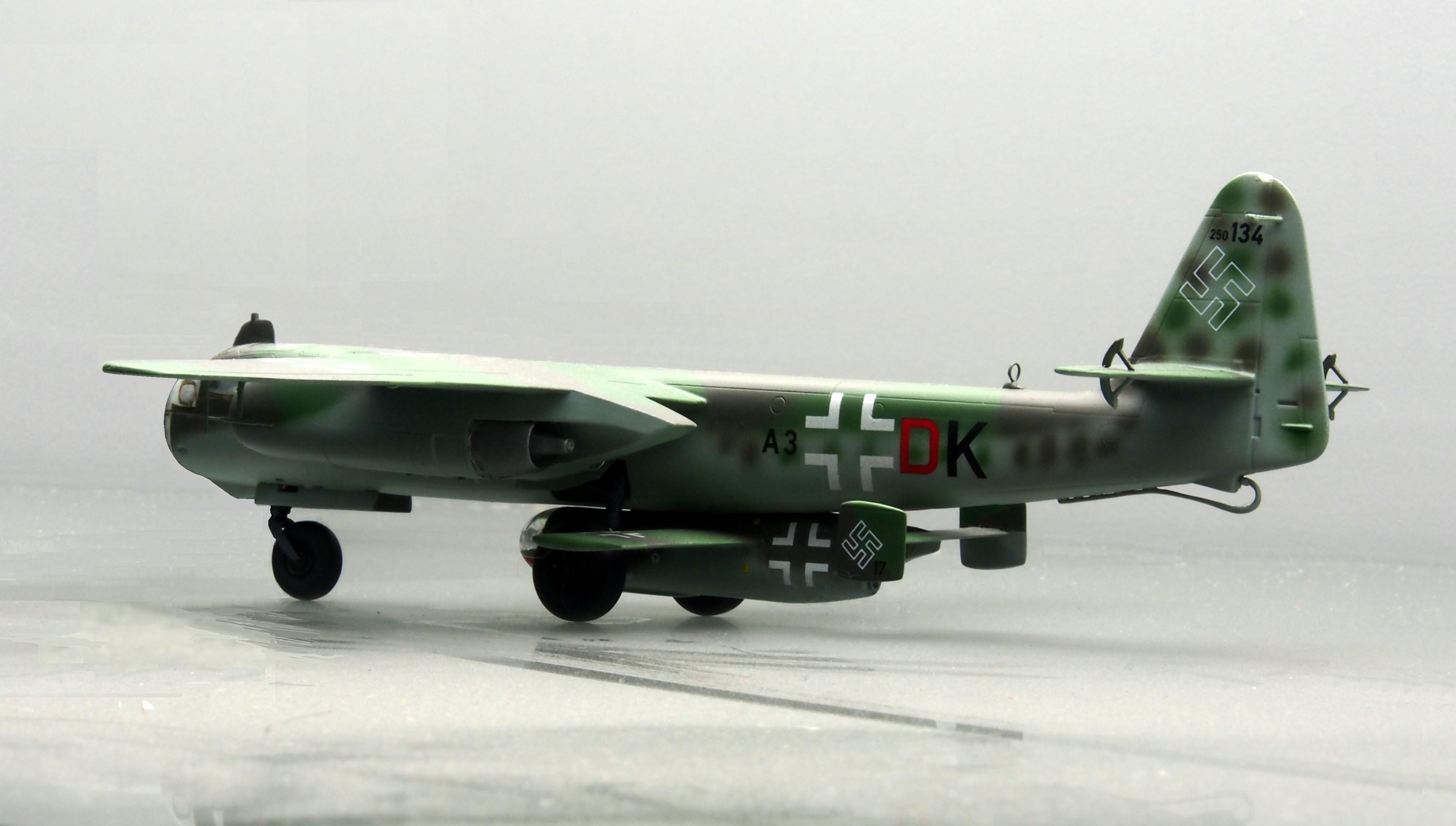 Arado-234 V21 carrying an Arado E.381